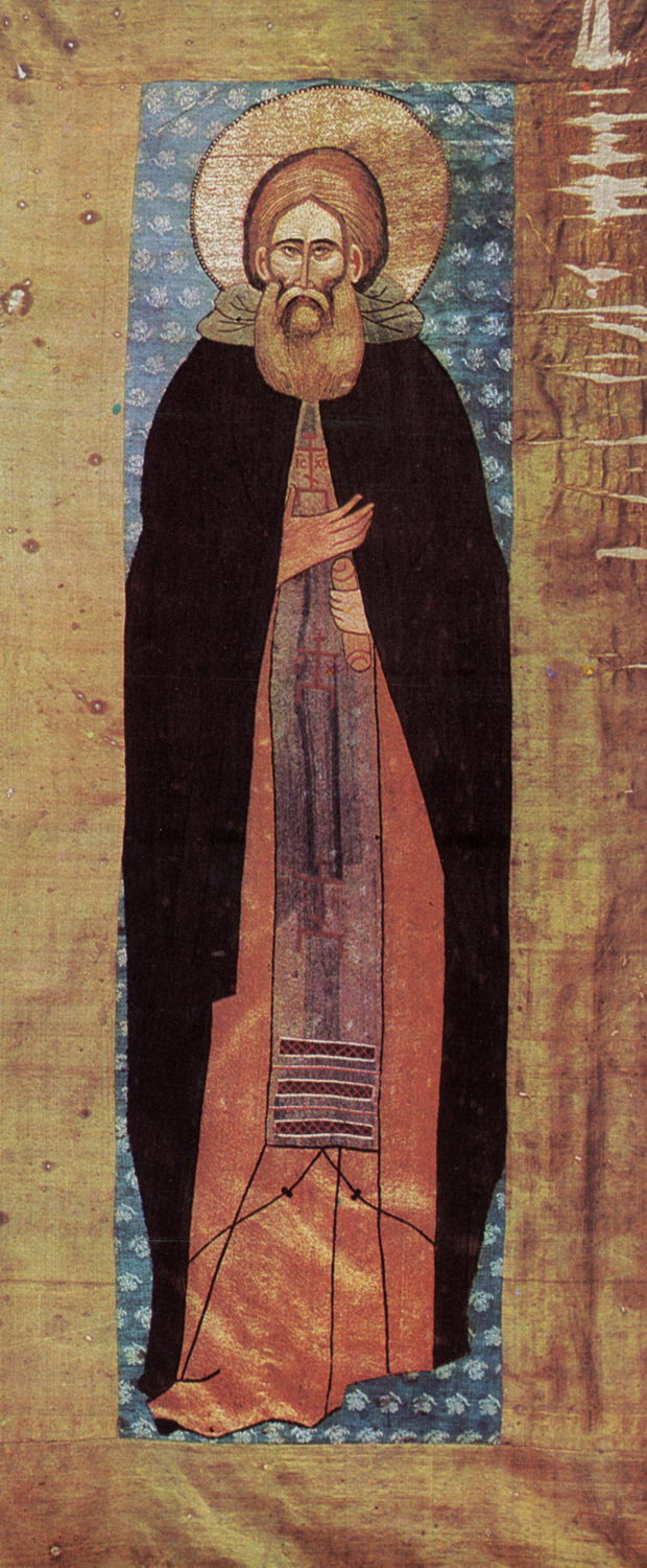 Serge de Radonège // Сергий Радонежский. Покров. 20-е годы XV в. Датировка: 15 в. 1422-1424 гг. Материал: Шелк, шелковые, золотные и серебряные нити. Место хранения: Сергиево-Посадский государственный историко-художественный музей-заповедник Происхождение: Происходит из Троице-Сергиевой лавры. Размер: 196 х 84 Сохранность и реставрация: Изображение вырезано с первоначального фона (коричневой камки) и переложено на голубую шелковую ткань XVIII в.; правый нижний угол фигуры утрачен. Описание: Лик Сергия шит телесным шелком крупными швами "в раскол" по направлению мускулов с оттенением серым и коричневым шелками разных тонов. Абрис лица, нос, губы и руки описаны стежками красного шелка. Им же зашиты ушные раковины. В волосах и бороде серые, коричневые и красные нити, нимб пряденого золота, в одеждах шелковое шитье "в прикреп". Кайма светло-зеленого шелка, поздняя.